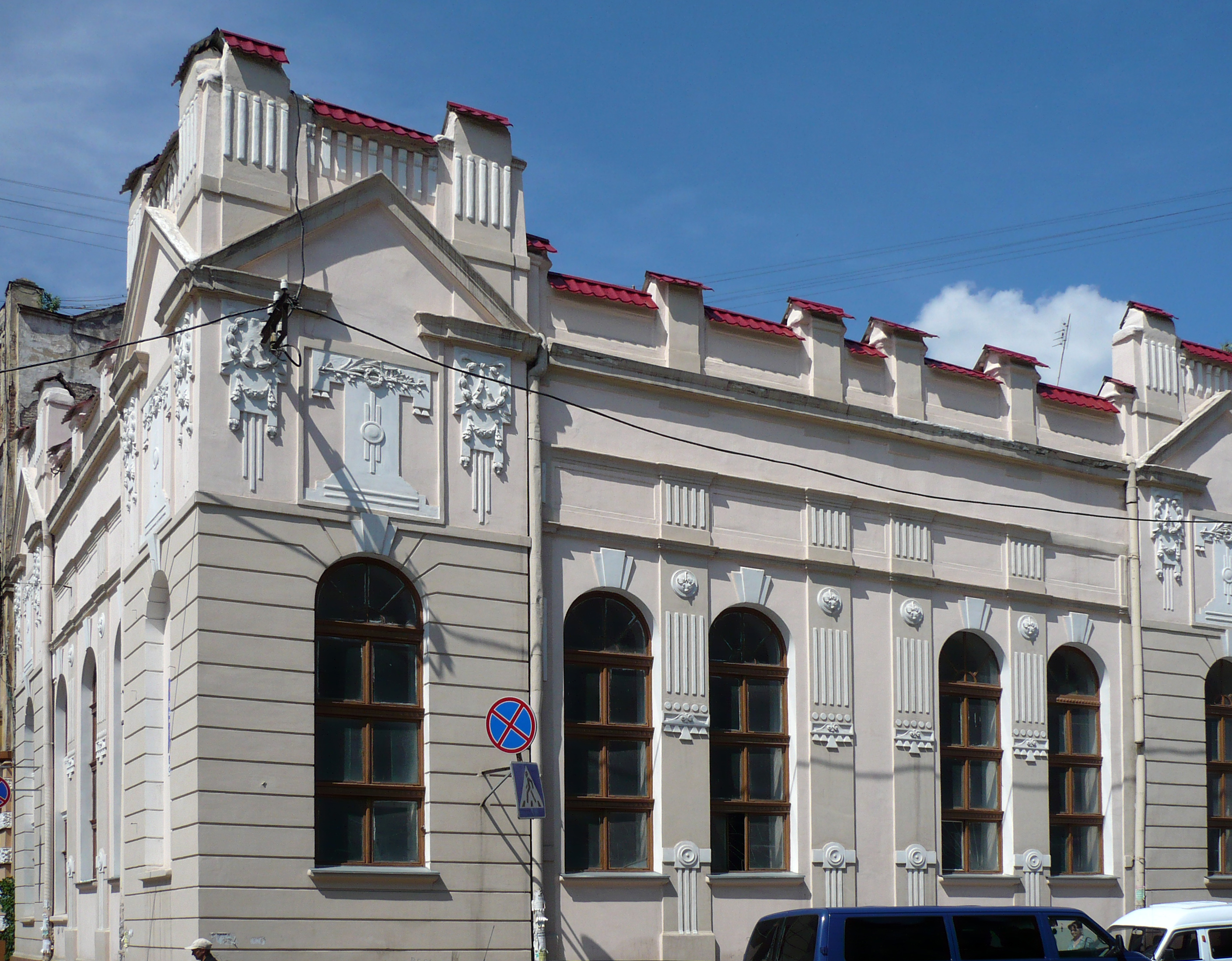 Synagoga z XIX w.